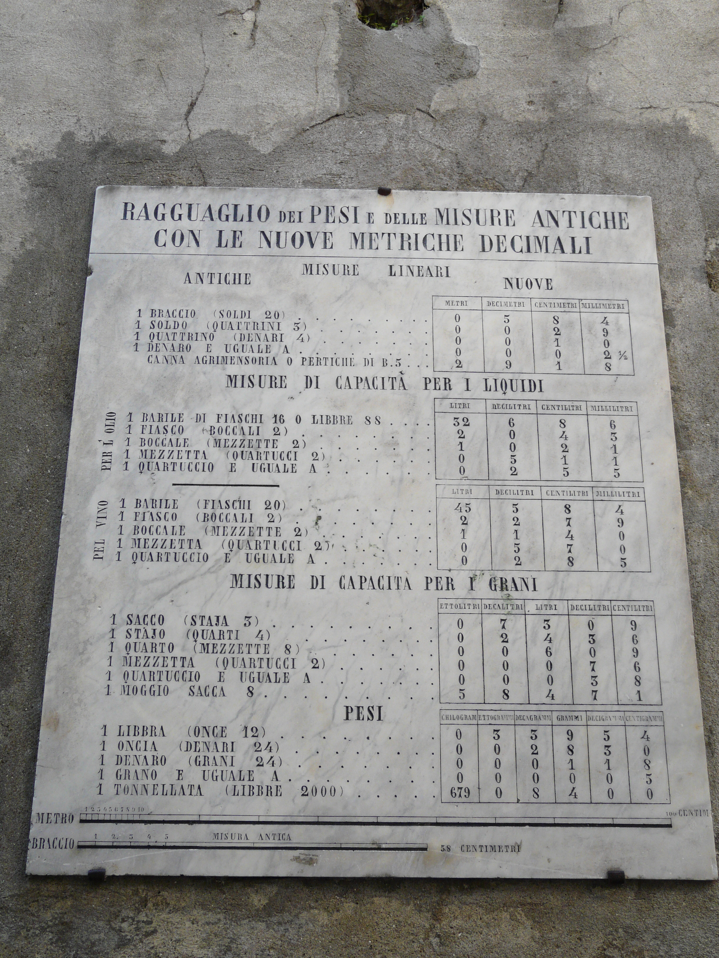 Lapide delle antiche misure pisane, Comune di Vicopisano, Toscana, Italia